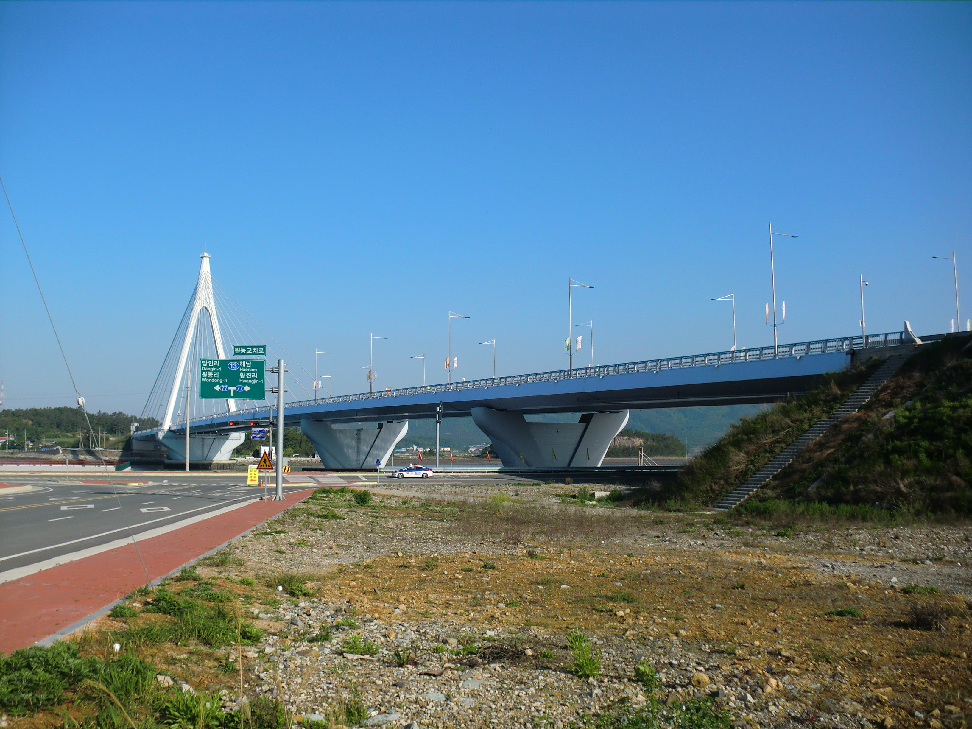 전라남도 완도군에 있는 완도대교